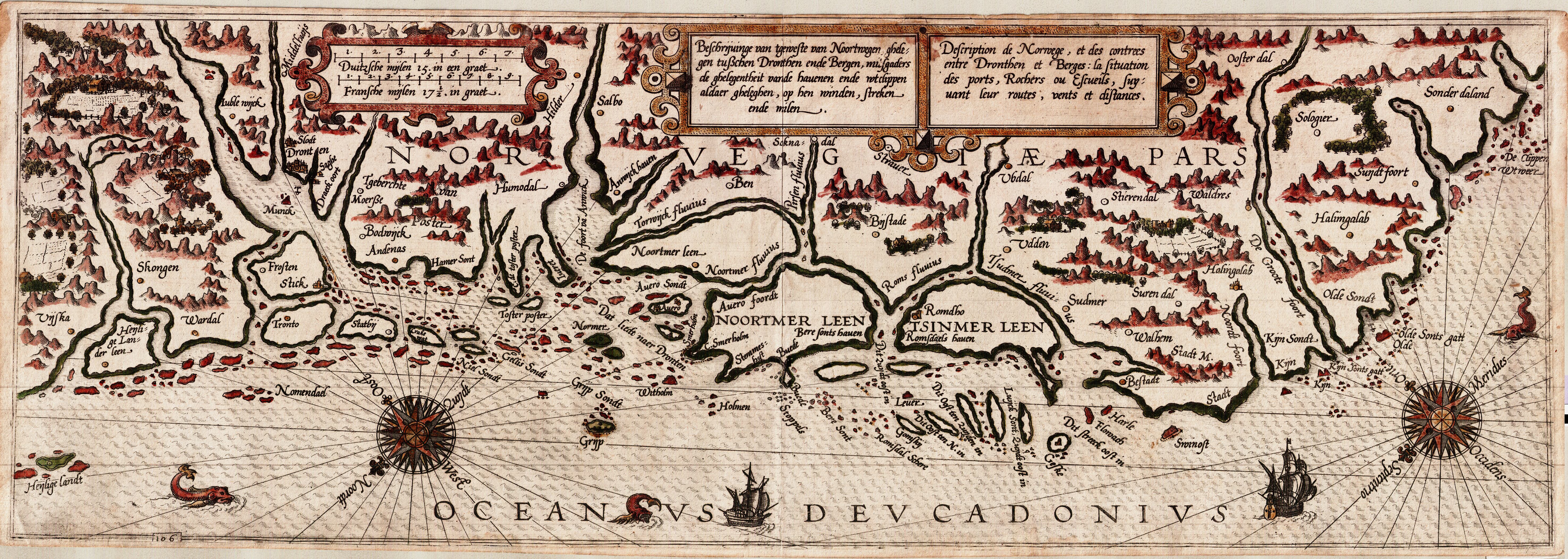 Sjøkart over kysten av Norge, fra Trondheim til Bergen, fra 1592. Håndtegnet i omtrentlig målestokk 1:700 000. Original kartstørrelse ca 56 x 20 cm. Et eksemplar befinner seg hos Statens kartverk Sjø i Stavanger.